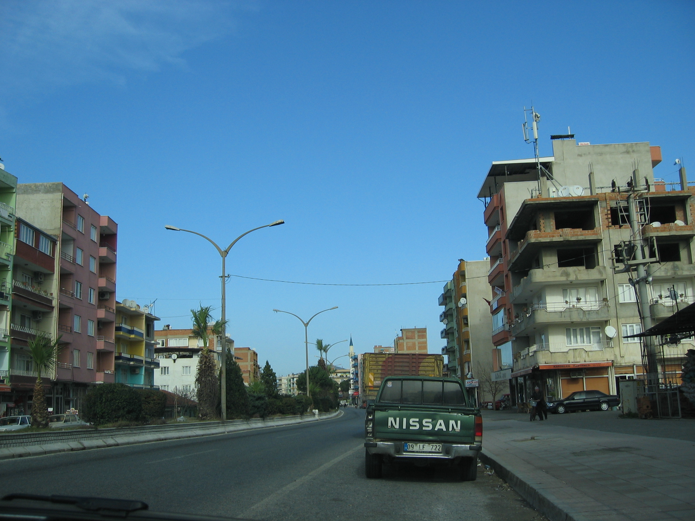 Cine (01.01.2010) 20° sunny / günesli 20°